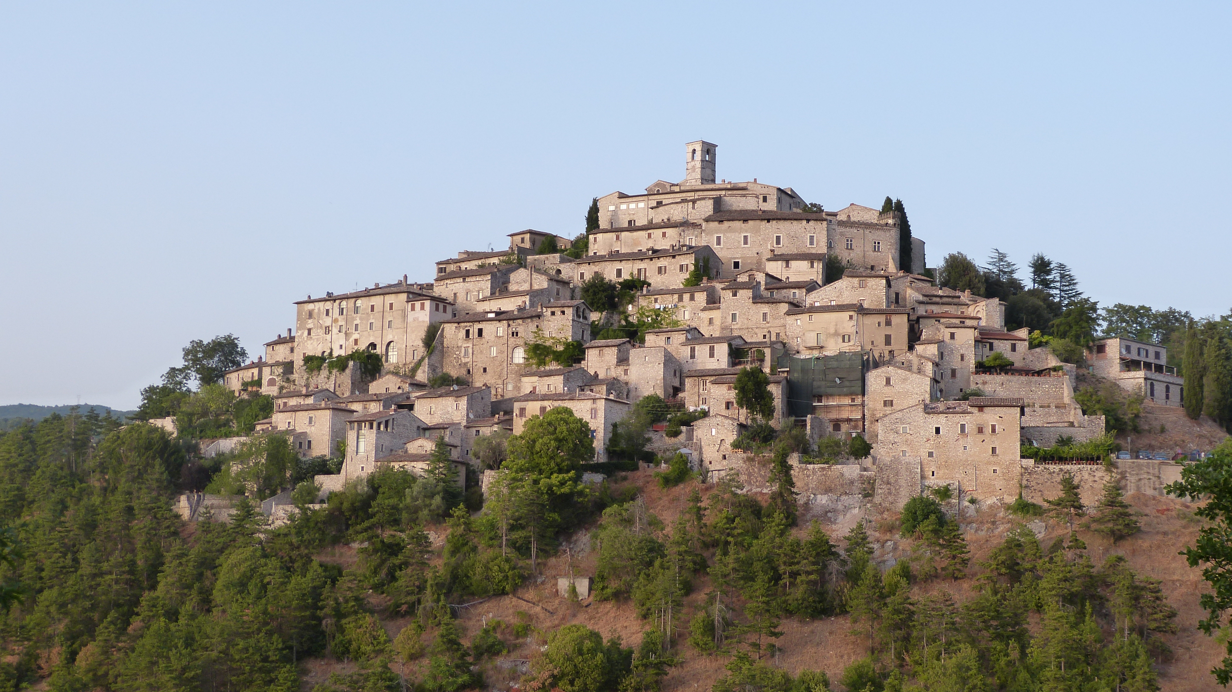 Veduta di Labro, nel Lazio, verso il confine con l'Umbria.